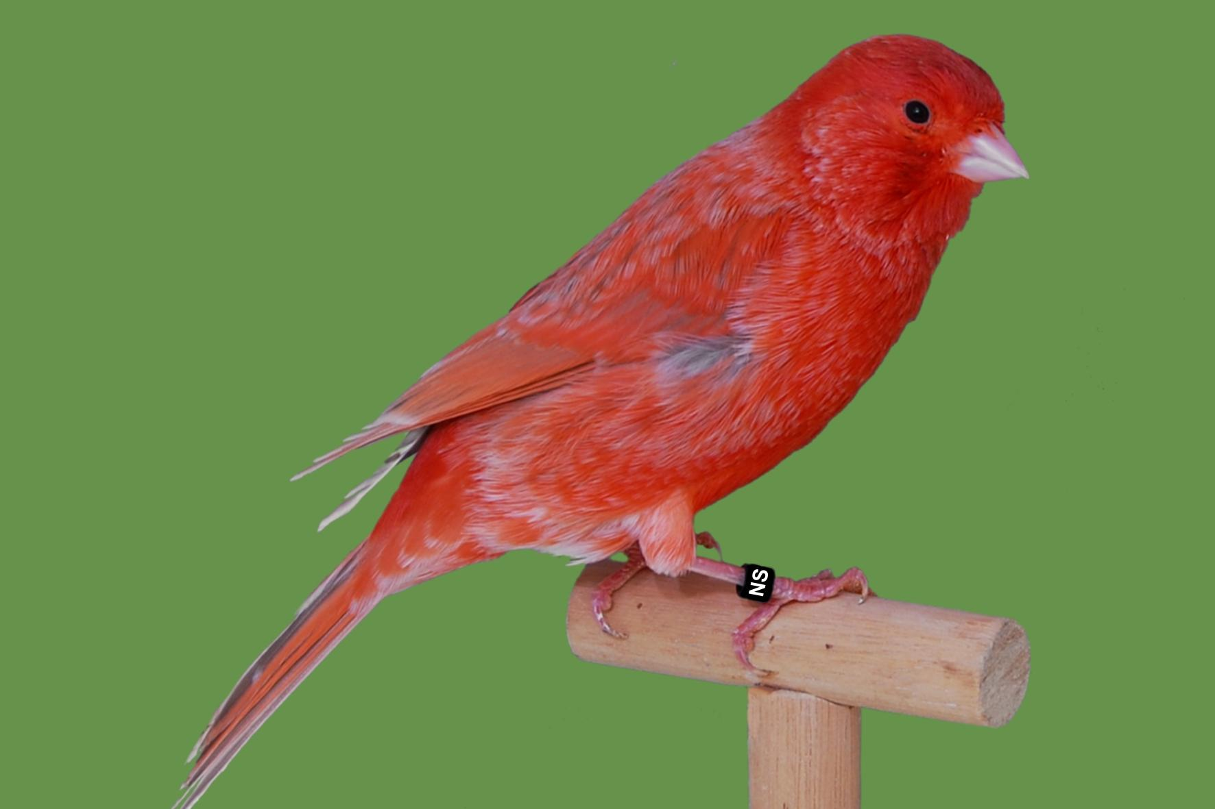 Farbenkanarie Isabell Rot schimmel